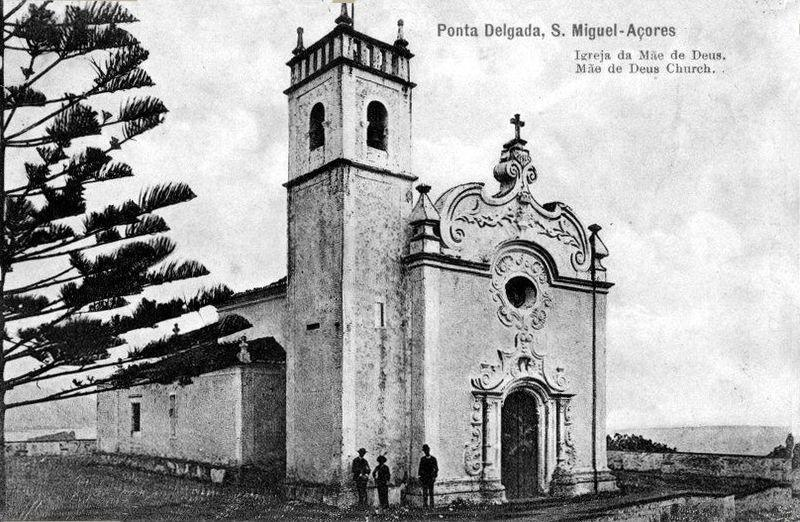 Fachada da capela da Madre de Deus. Fotografia da primitiva capela, 1900 (c.). Freguesia de São Pedro de Ponta Delgada. Imagem de Jorge Forjaz. Ilha de São Miguel, Açores. Esta capela foi construída por 1538, tendo ali trabalhado Nicolau Fernandes, um dos mestres da matriz de São Sebastião. Teria ainda obras por 1567 e foi depois reconstruída por volta de 1770, pelo célebre negociante Nicolau Maria Raposo, que ali pretendeu ser enterrado. Na 1.ª Grande Guerra foi demolida para ali ser levantada uma fortificação. Veio a ser reconstruída, já com algum gosto do Estado Novo poucos anos depois. (Rui Carita)